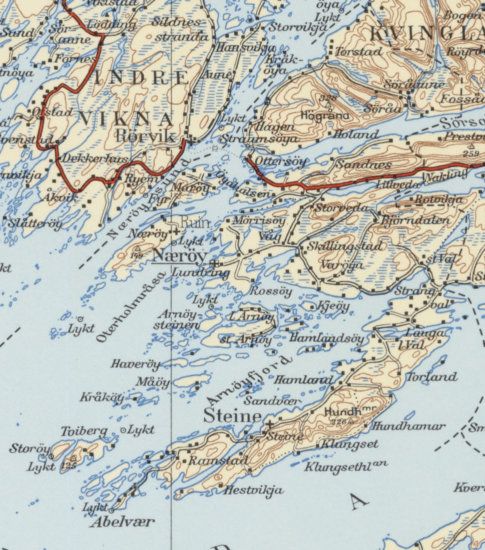 Utsnitt av Nærøy herred.